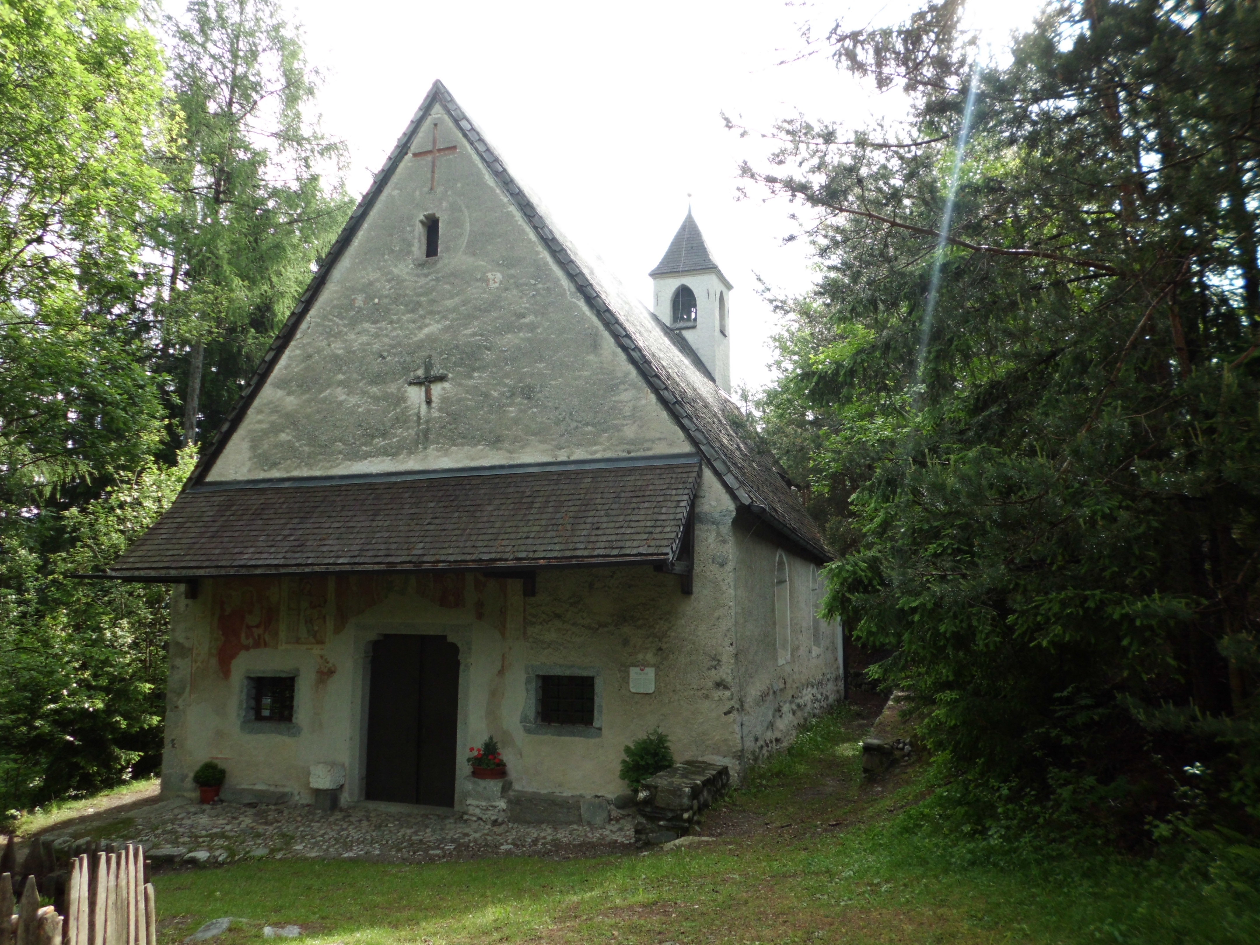 Die Kirche von St. Cyrill bei Tils (Brixen, Südtirol) von Westen gesehen